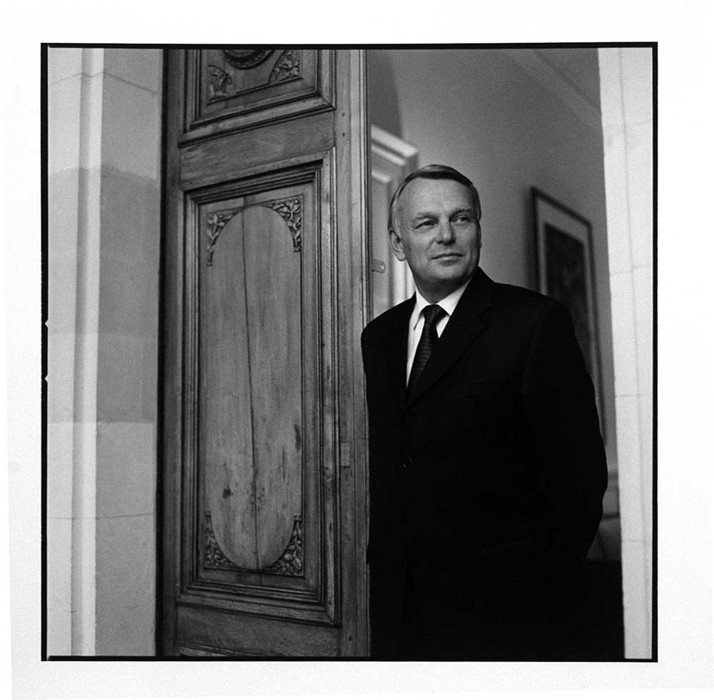 Portrait de Jean-Marc Ayrault, Député-maire de Nantes, Président du groupe socialiste à l'Assemblée nationale